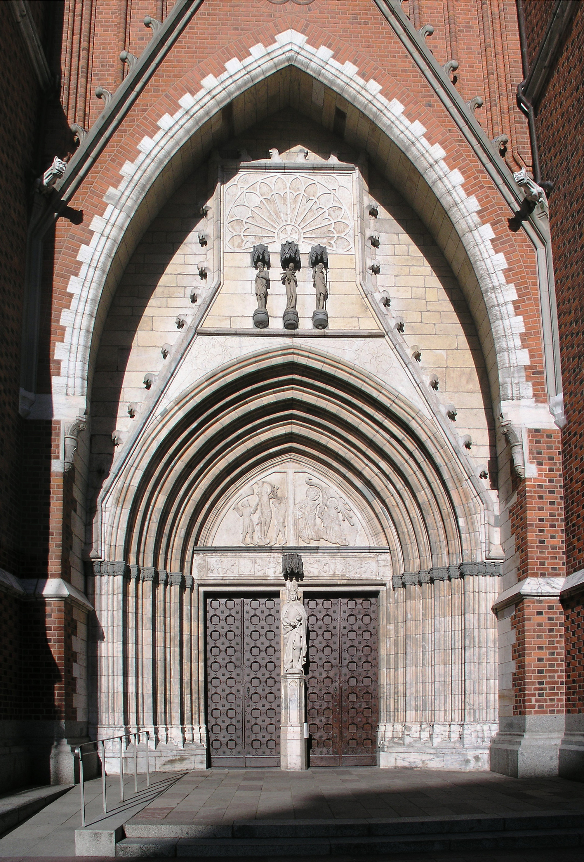 Uppsala domkyrka / Uppsala cathedral.